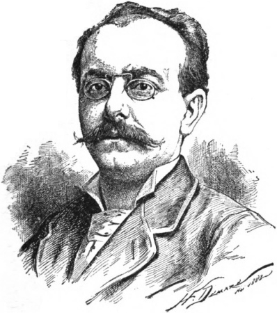 Léo Taxil, designé par H. Demare, comme il apparut dans "Os mistérios da egreja", une traduction en portugais.